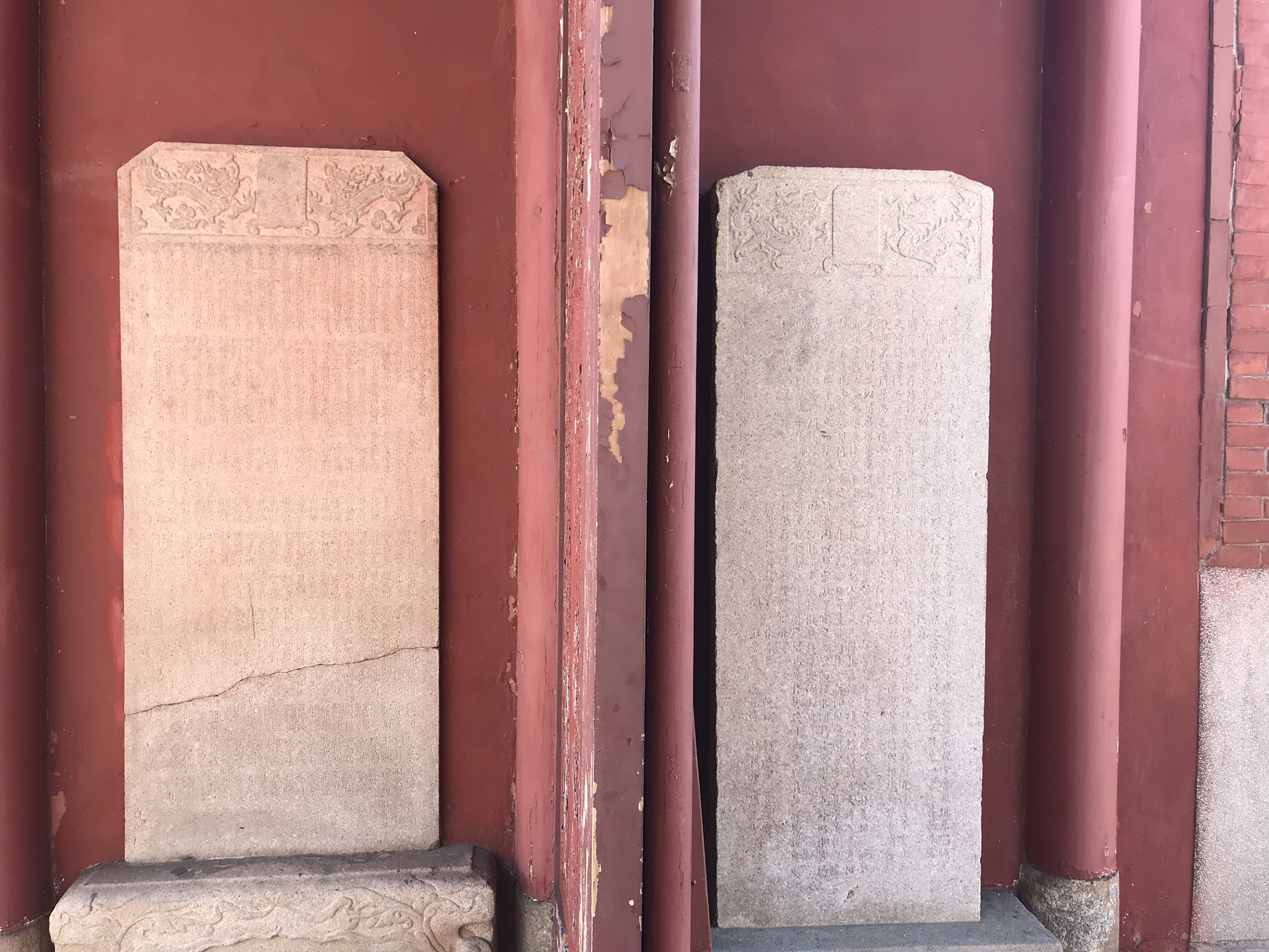 中文（台灣）: 彰化孔子廟道光二十年重新彰化縣學碑、光緒六年重修邑學碑